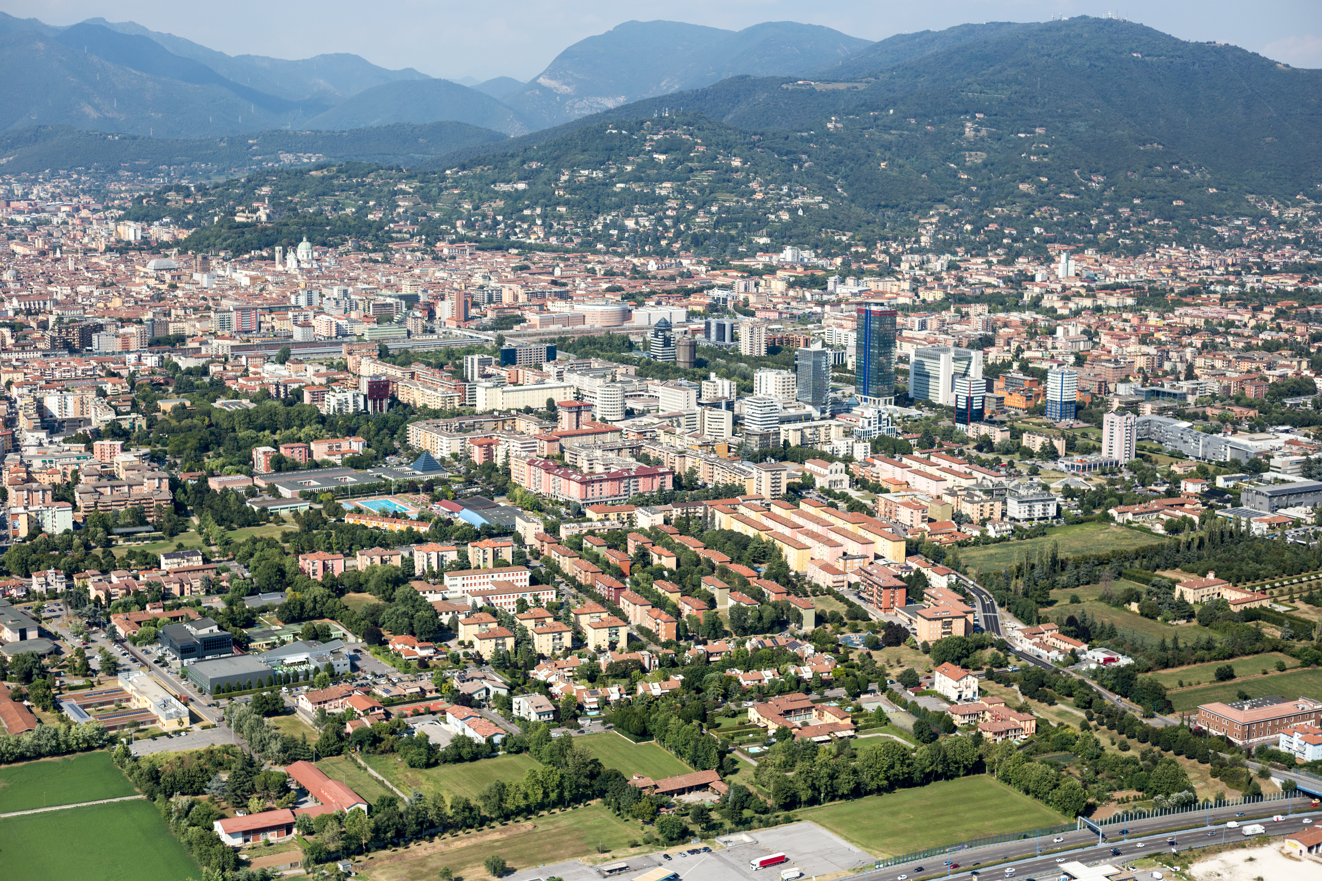 Foto aerea di Brescia scattata da E. Ibanez in deltaplano a motore il 16/07/2019